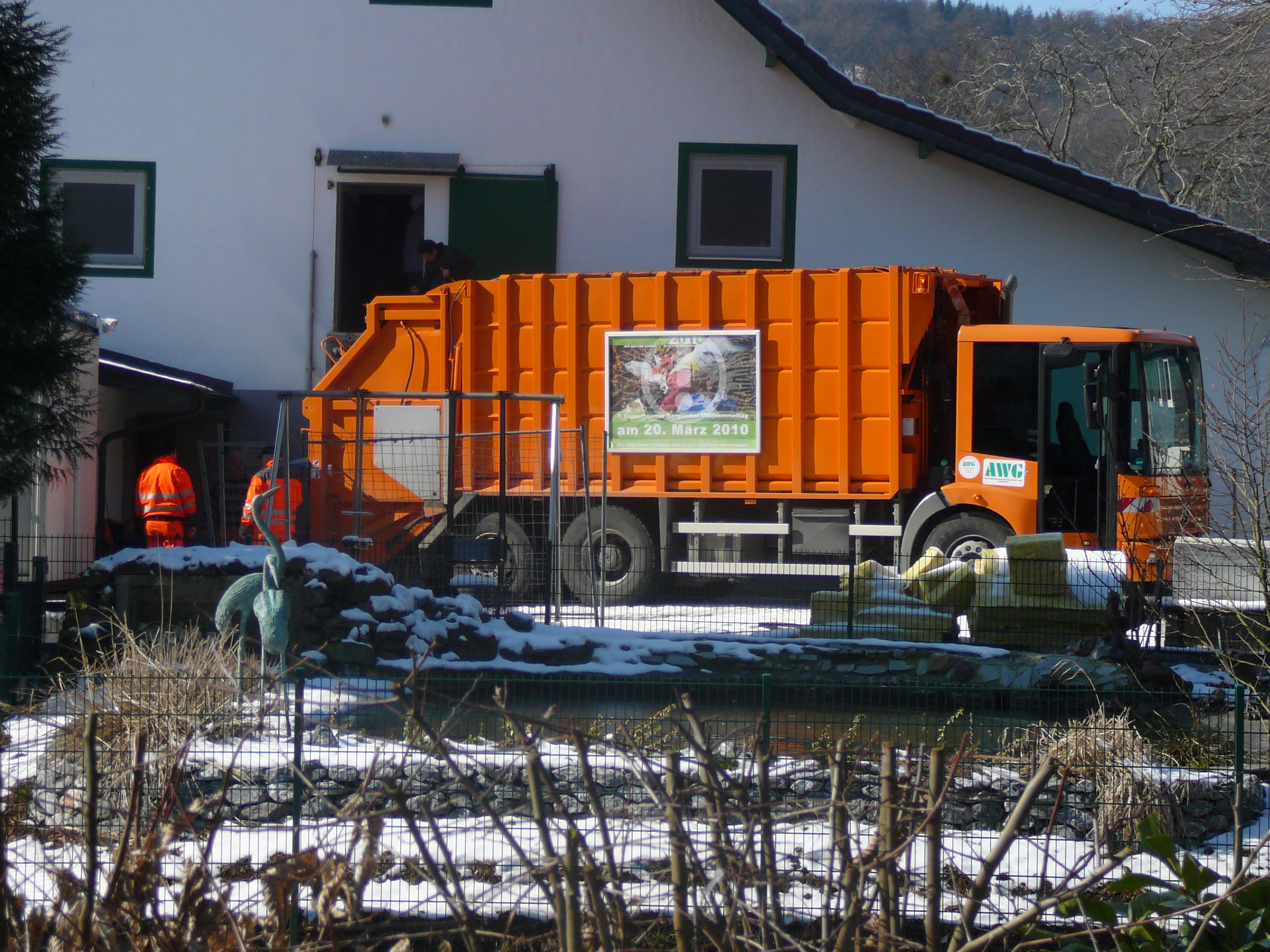 Buchenhofen, Wuppertal